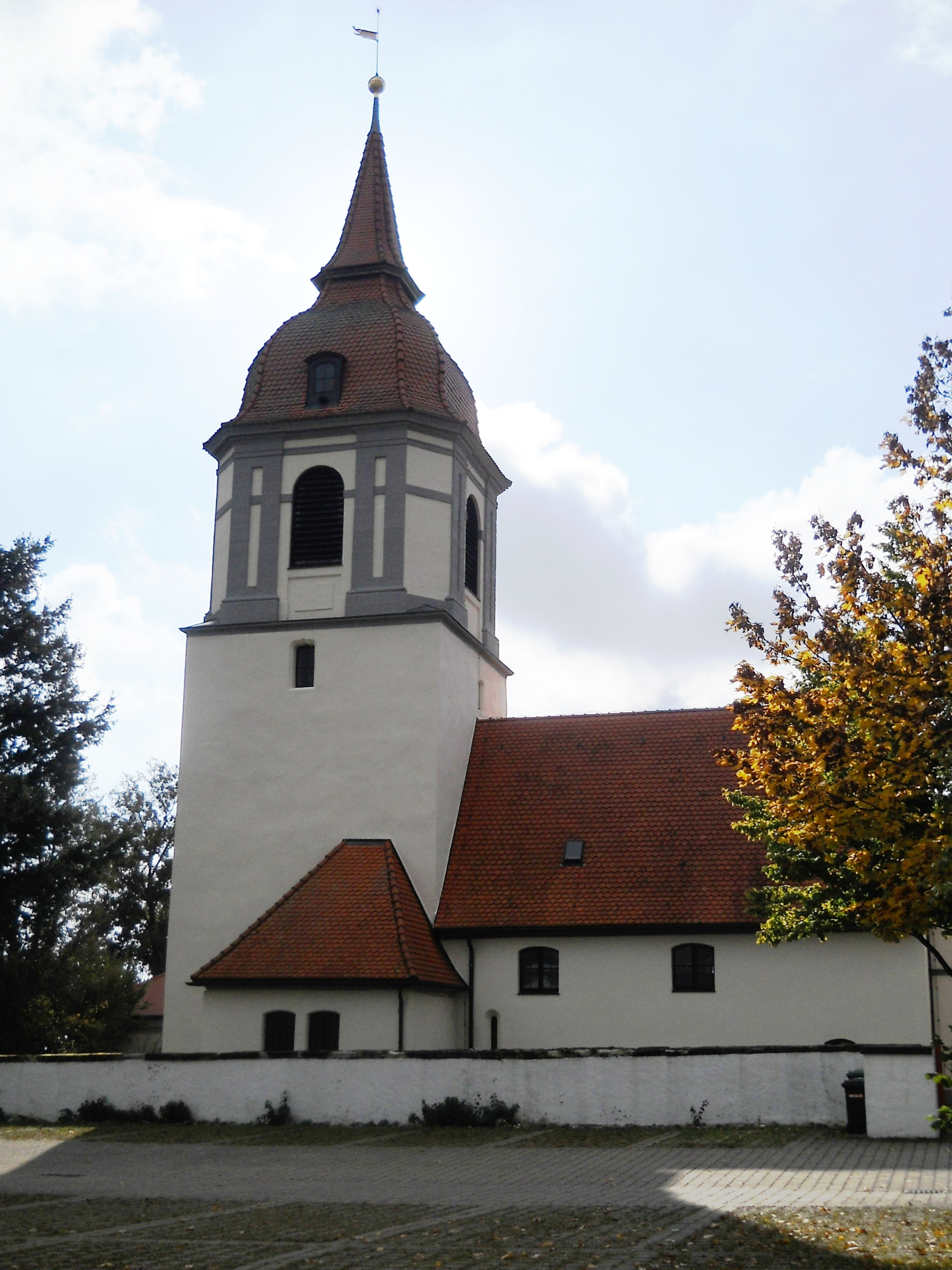 Unterasbach, Ortsteil von Gunzenhausen im mittelfränkischen Landkreis Weißenburg-Gunzenhausen (Bayern), Evangelische Pfarrkirche St. Michael (Nordseite)